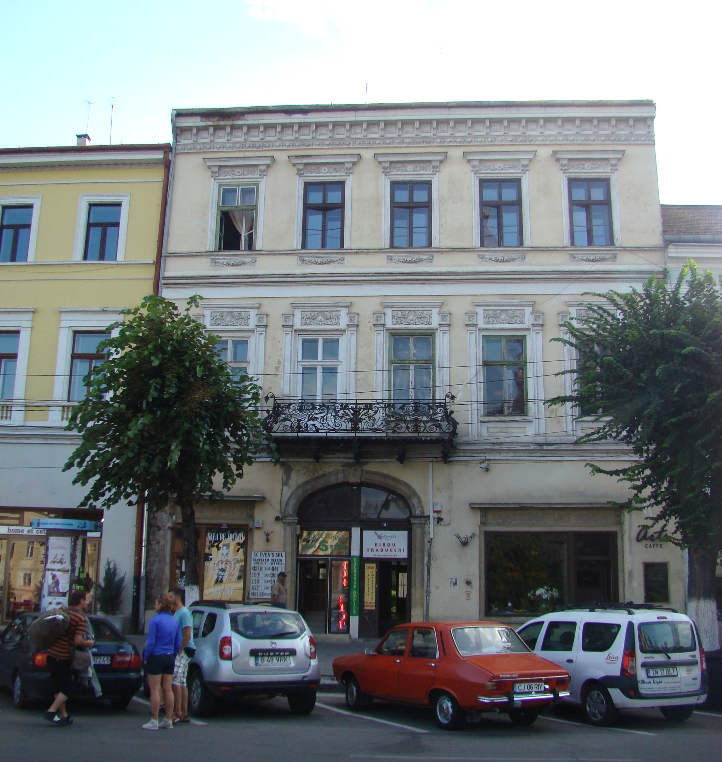 Clădire monument istoric, Piața Unirii, nr.14